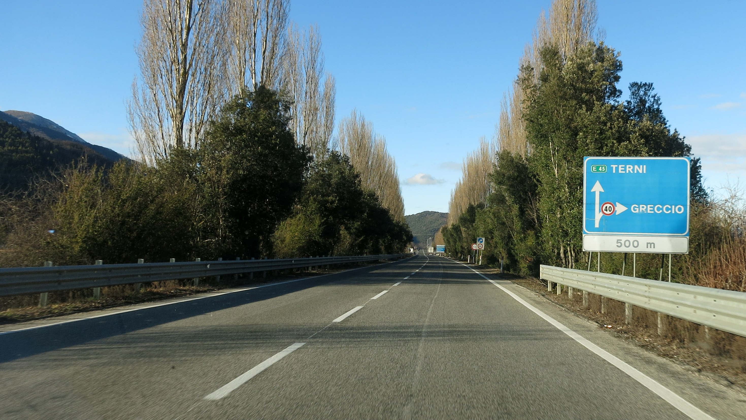 Svincolo di Greccio posto sulla strada statale 79 Ternana (superstrada Rieti-Terni) fotografato in direzione Terni